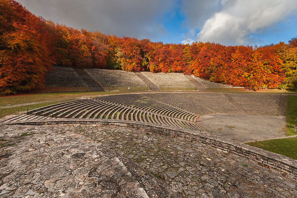 Niezwykle unikatowy amfiteatr skalny na Górze Św. Anny w jesiennej scenerii.